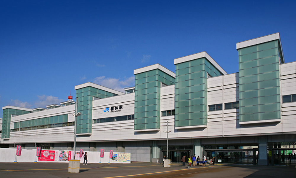 JR West Fukui station